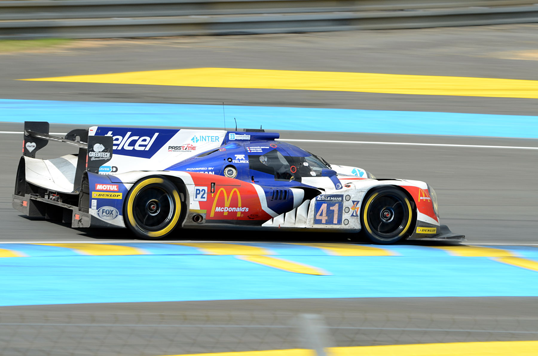 La Ligier JS P2 - Nissan de l'écurie Greaves Motorsport pilotée par Memo Rojas, Julien Canal et Nathanaël Berthon lors des 24 Heures du Mans 2016